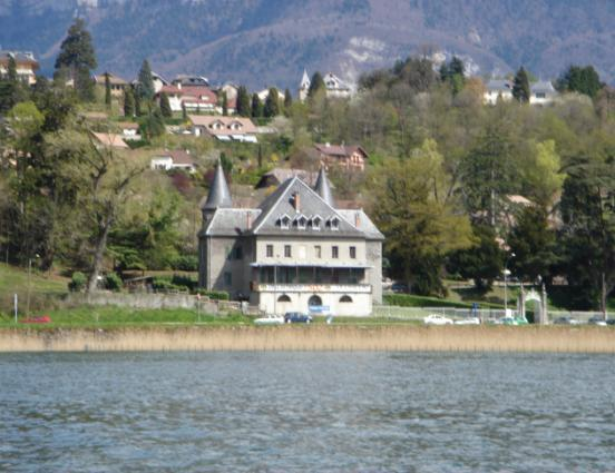 Le château de bon port à Tresserve en Savoie (73) deux ans avant sa totale destruction par un incendie déclaré le 19 Juillet 2008.